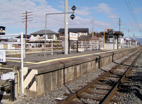 Ashigawa Station, Ichikawamisato, Yamanashi, Japan